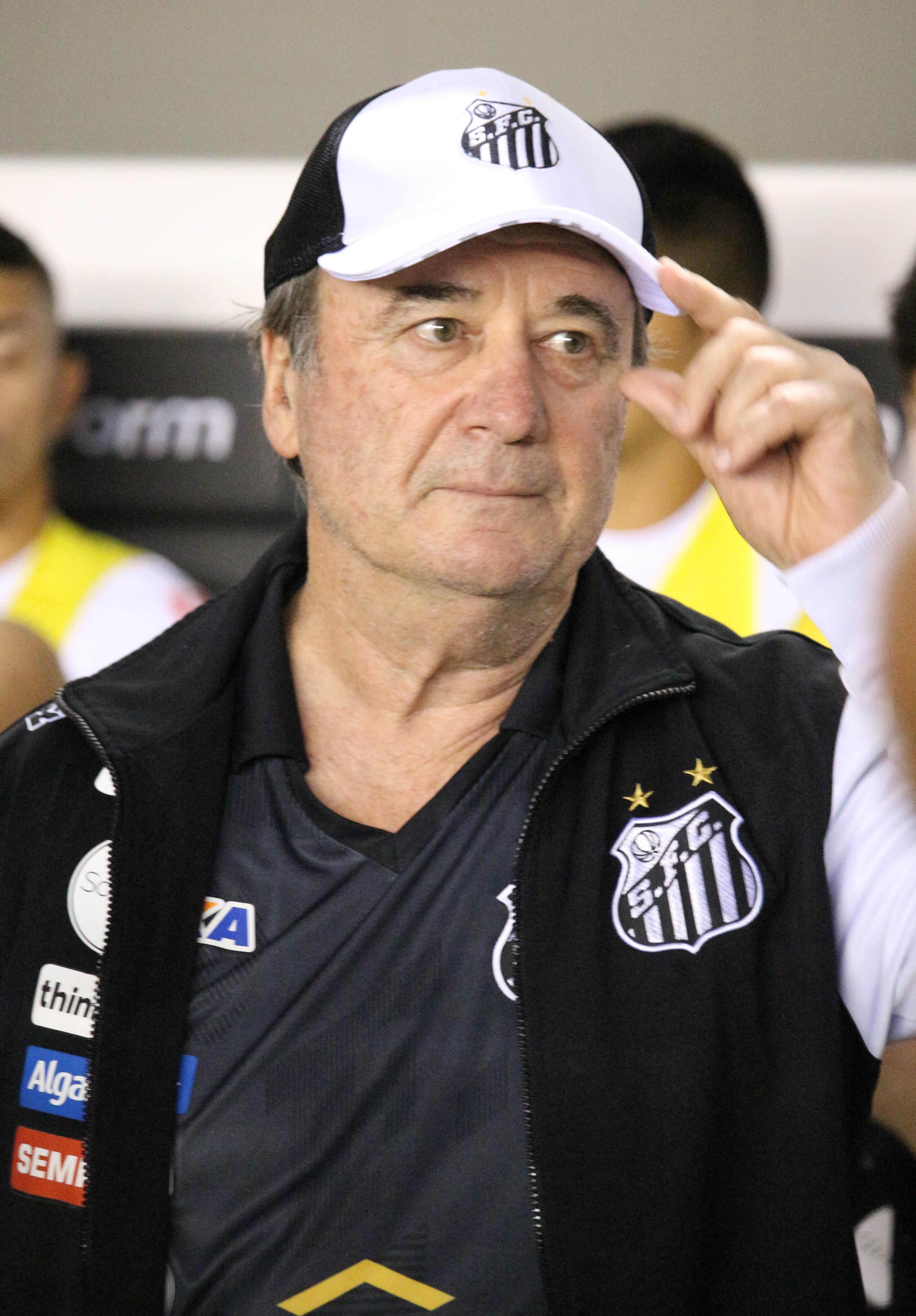 Foto: Douglas Teixeira/Futebol Santista